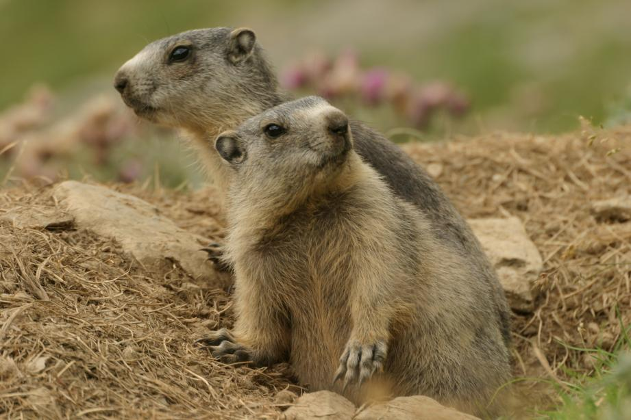 Auteur : Sylvain HAYE Prise dans les Pyrénées